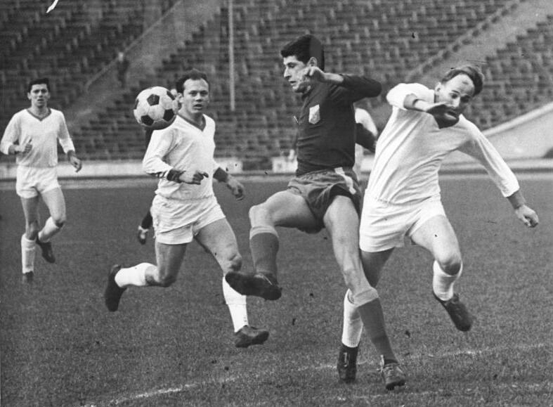 Zentralbild-Koch Ho 30.3.1966 Halbfinale um den FDGB-Pokal im Fußball am 30.3.66 im Leipziger Zentralstadion - Chemie Leipzig gegen Motor Zwickau 2:0 - Von rechts nach links: Beier (Motor Zwickau), Matoul (Chemie Leipzig), Franz (Motor Zwickau).